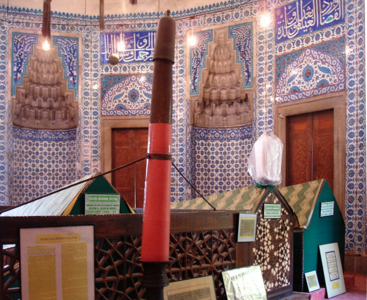 La türbe (cappella funeraria) di Roxellana nel cimitero della Moschea di Solimano il Magnifico ad Istanbul. Foto di: Giovanni Dall'Orto, 26-5-2006.